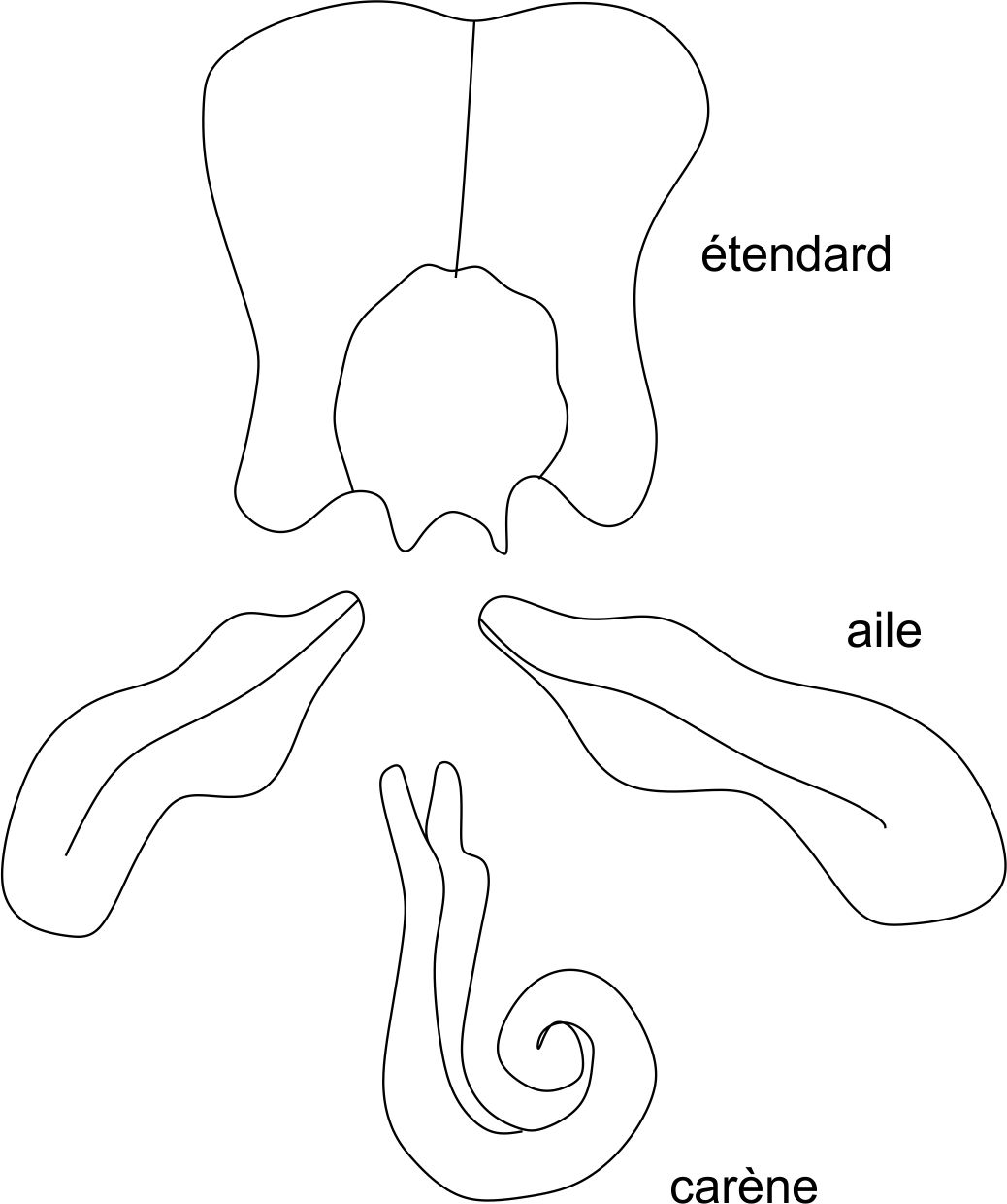 La corolle des Phaseolus se caractérise par une carène spiralée.